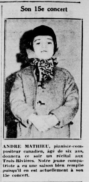 Le pianiste-compositeur André Mathieu alors âgé de six ans. La Patrie, 12 mai 1936.